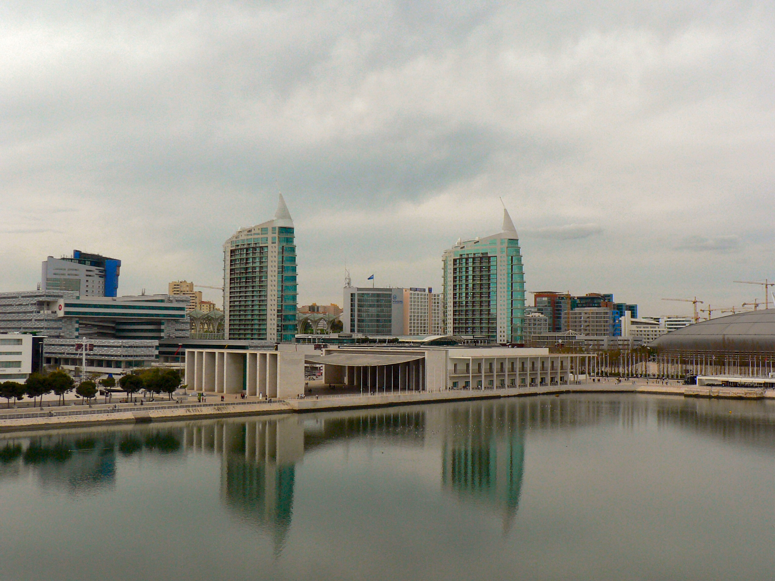 Pavilhão de Portugal no Parque das Nações em Lisboa (Vista do teleférico)